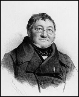 Famille Zoude Wallonie